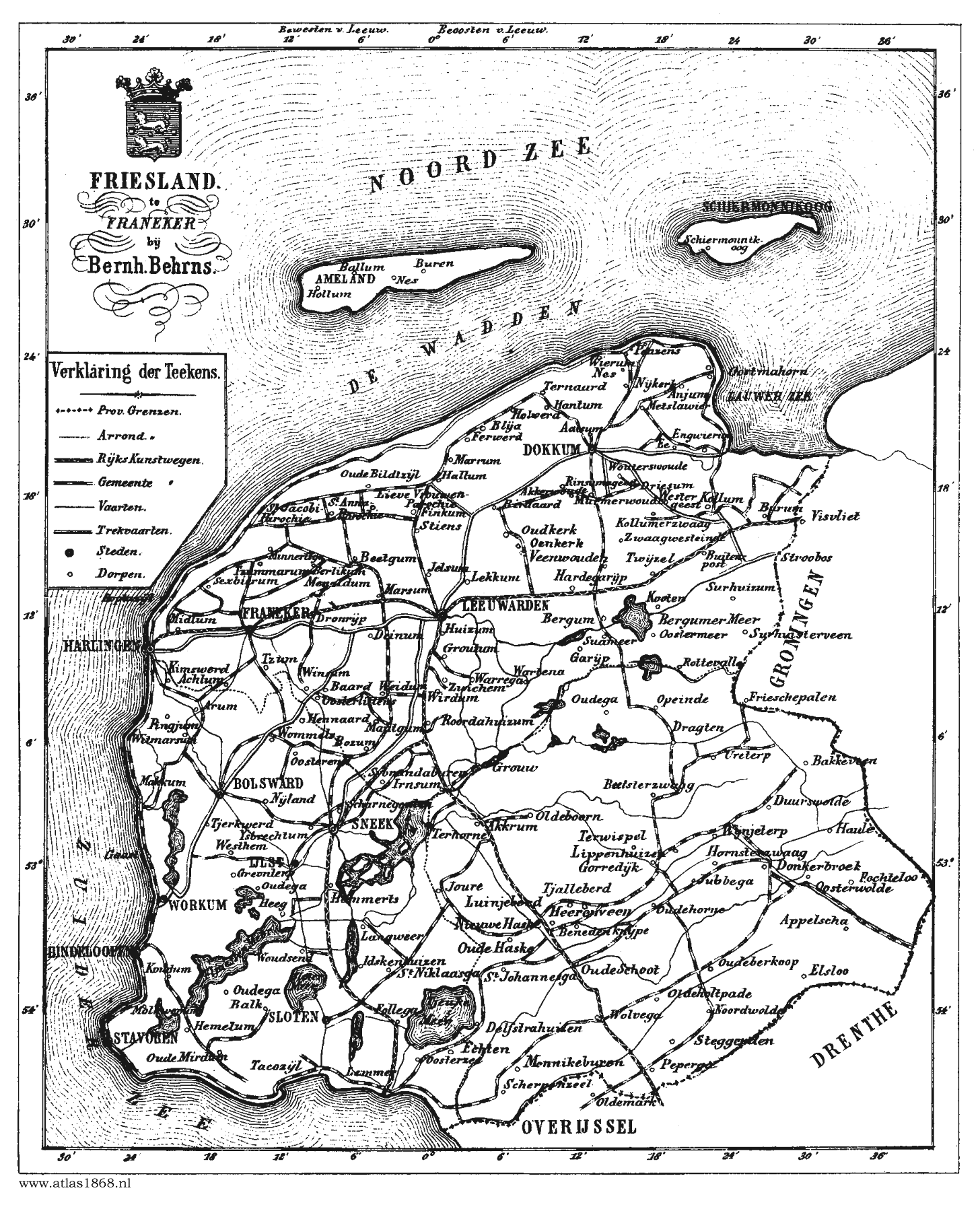 Provincie Friesland. Kaart uit Gemeente-atlas van Nederland, getekend door Jacob Kuyper De afbeelding komt van Het is de kaart van de provincie Friesland.